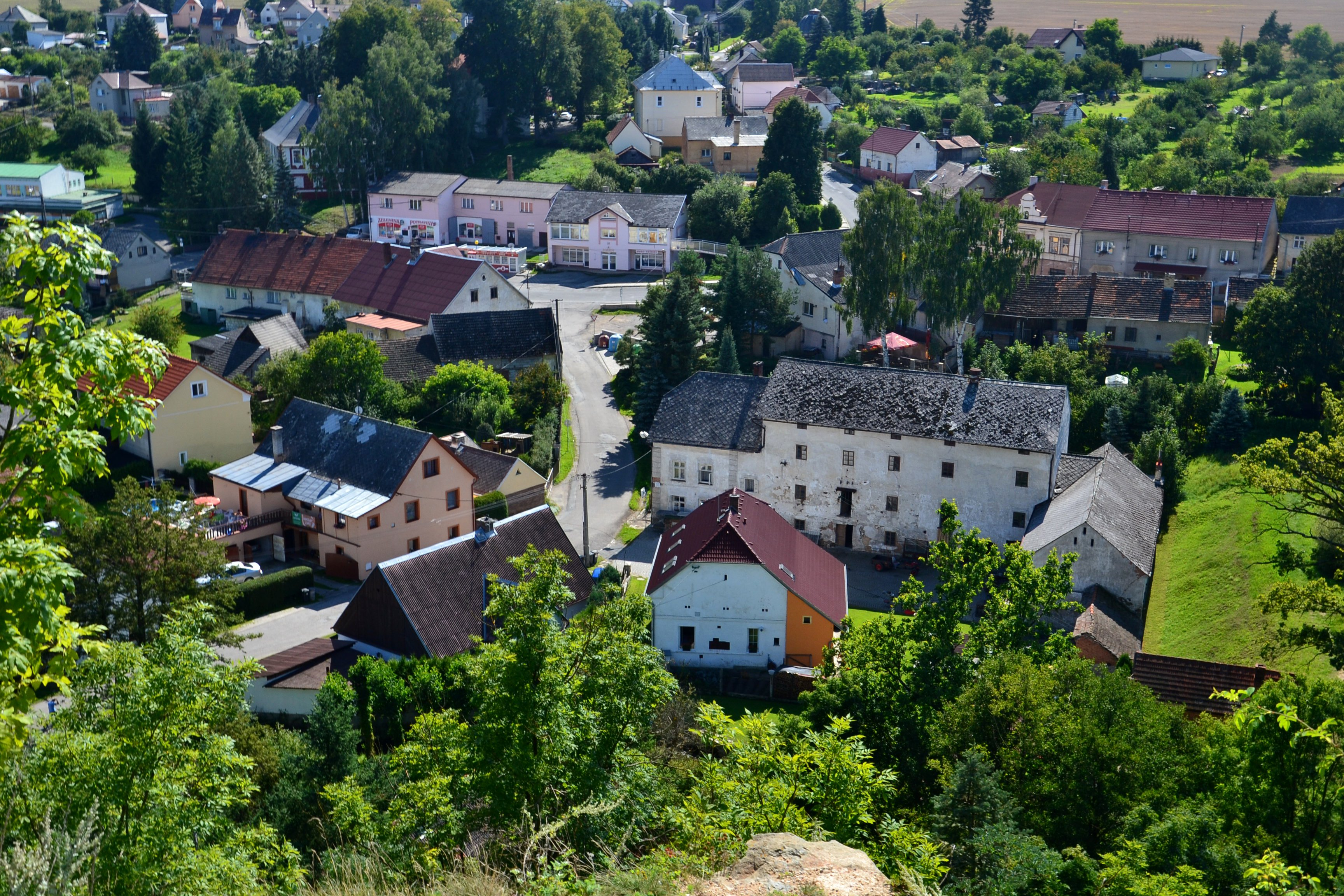 Dolní Bělá - střed obce z hradu